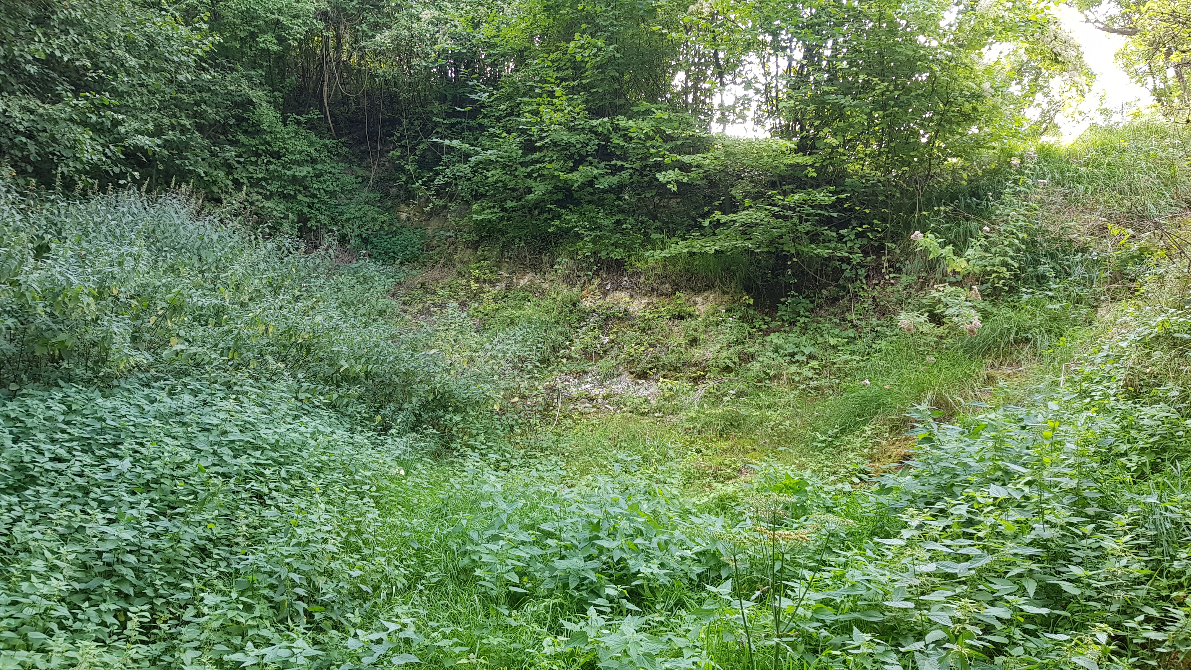 Groeve Keutenberg, Schin op Geul, Nederland